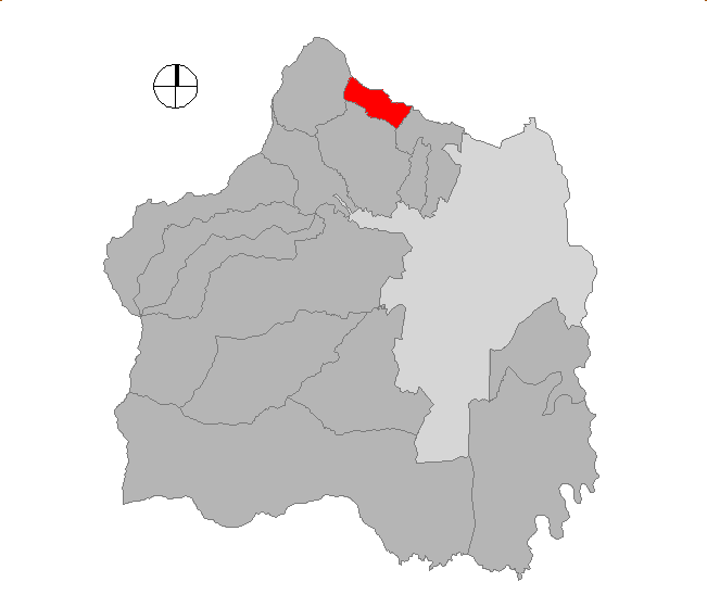 Corregimiento de Cali, Colombia